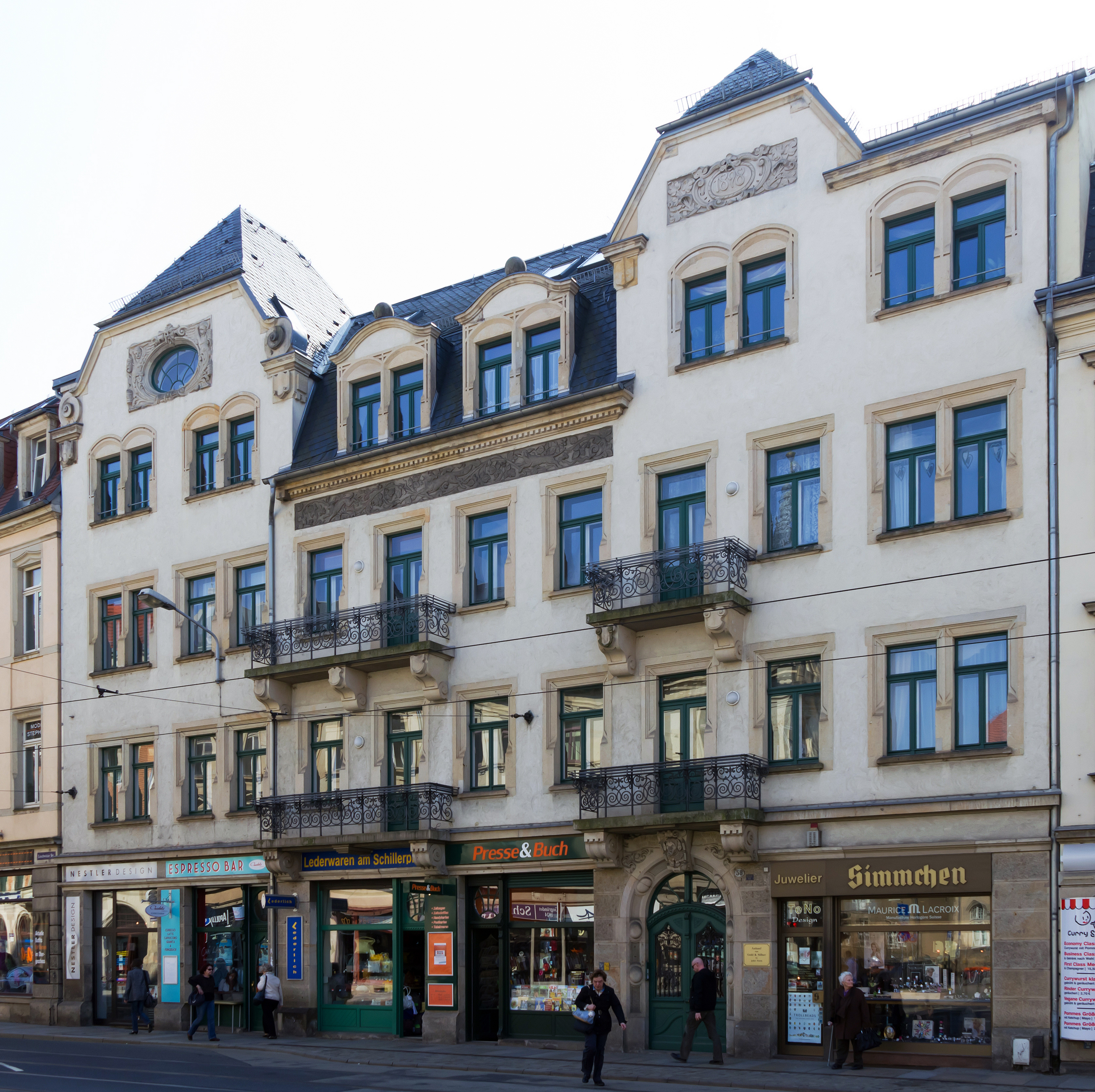 Loschwitzer Straße 58, Dresden